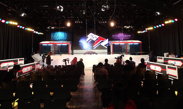 Gangnam GOMTV Studio